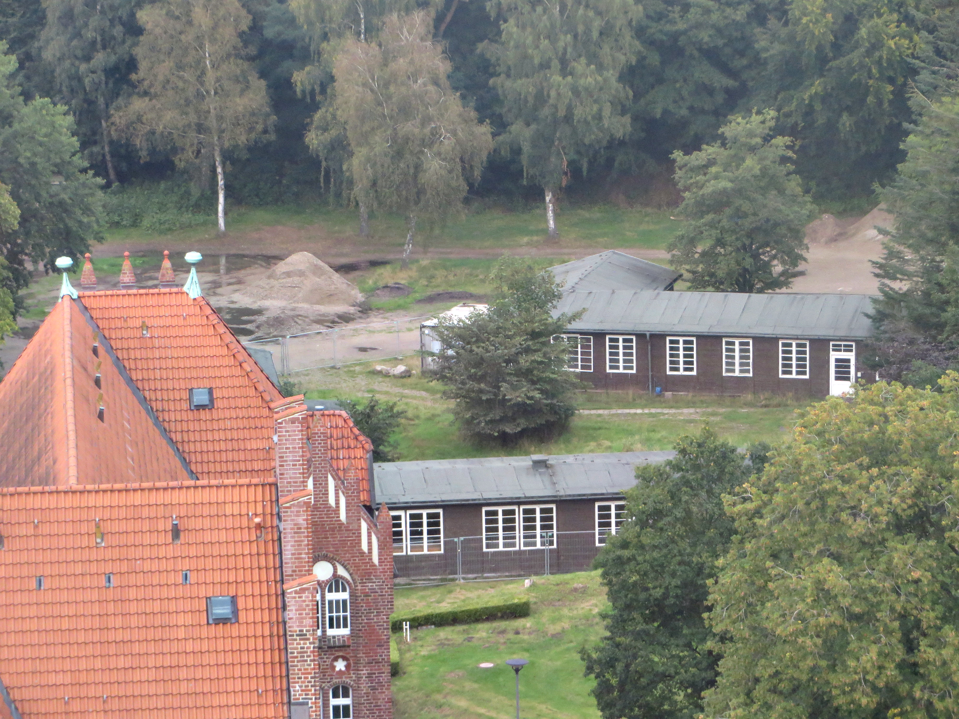 Blick zum Trampedachlager (September 2015)